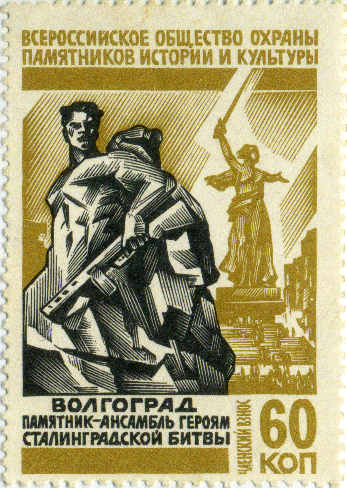 Непочтовая марка (членский взнос) Всероссийского общества охраны памятников истории и культуры